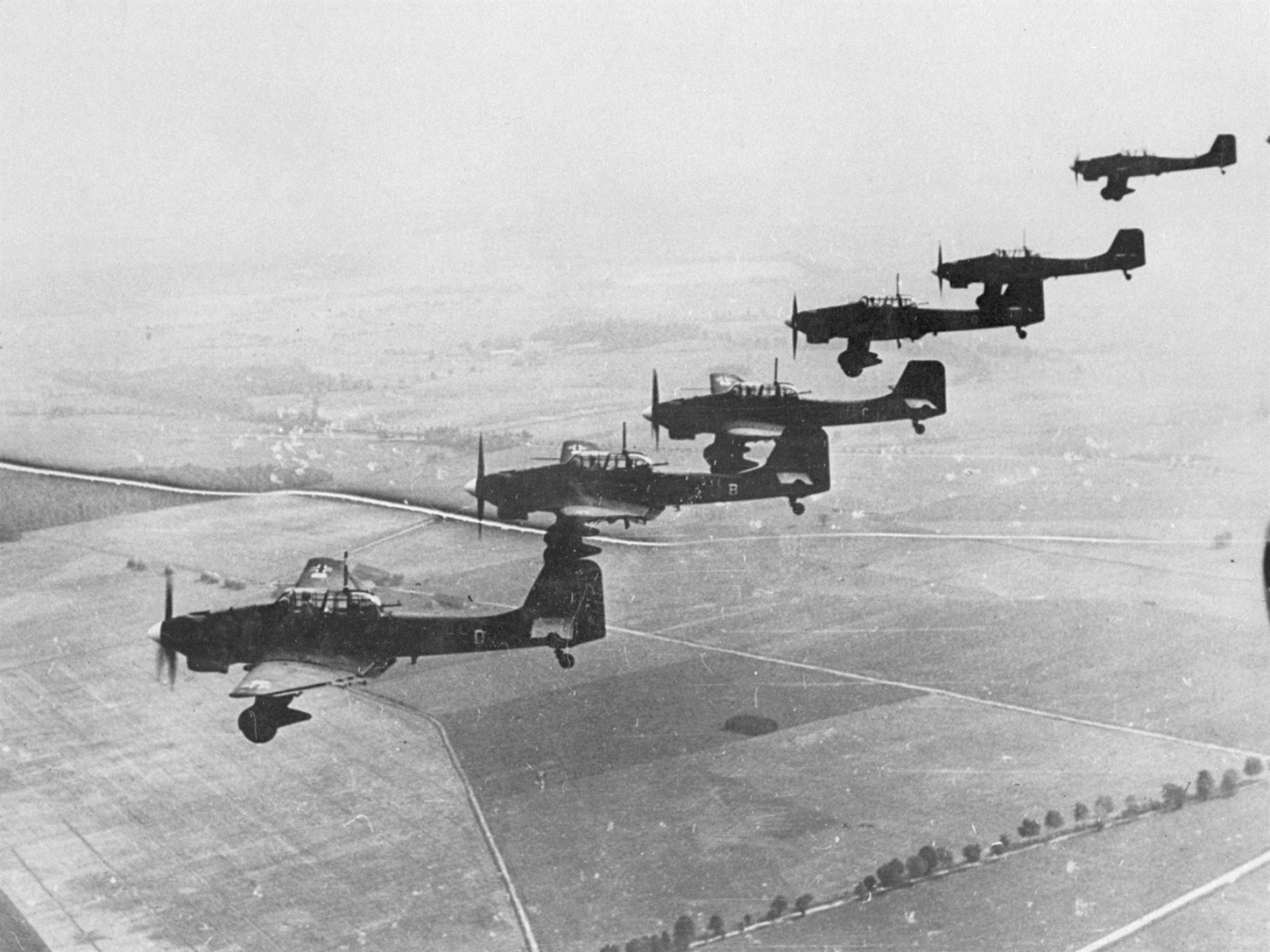 Luftsieg in Polen, Eine Staffel Stukas = Ju 87 = fliegt gegen den Feind. 4551-40 Information added by Wikimedia users.